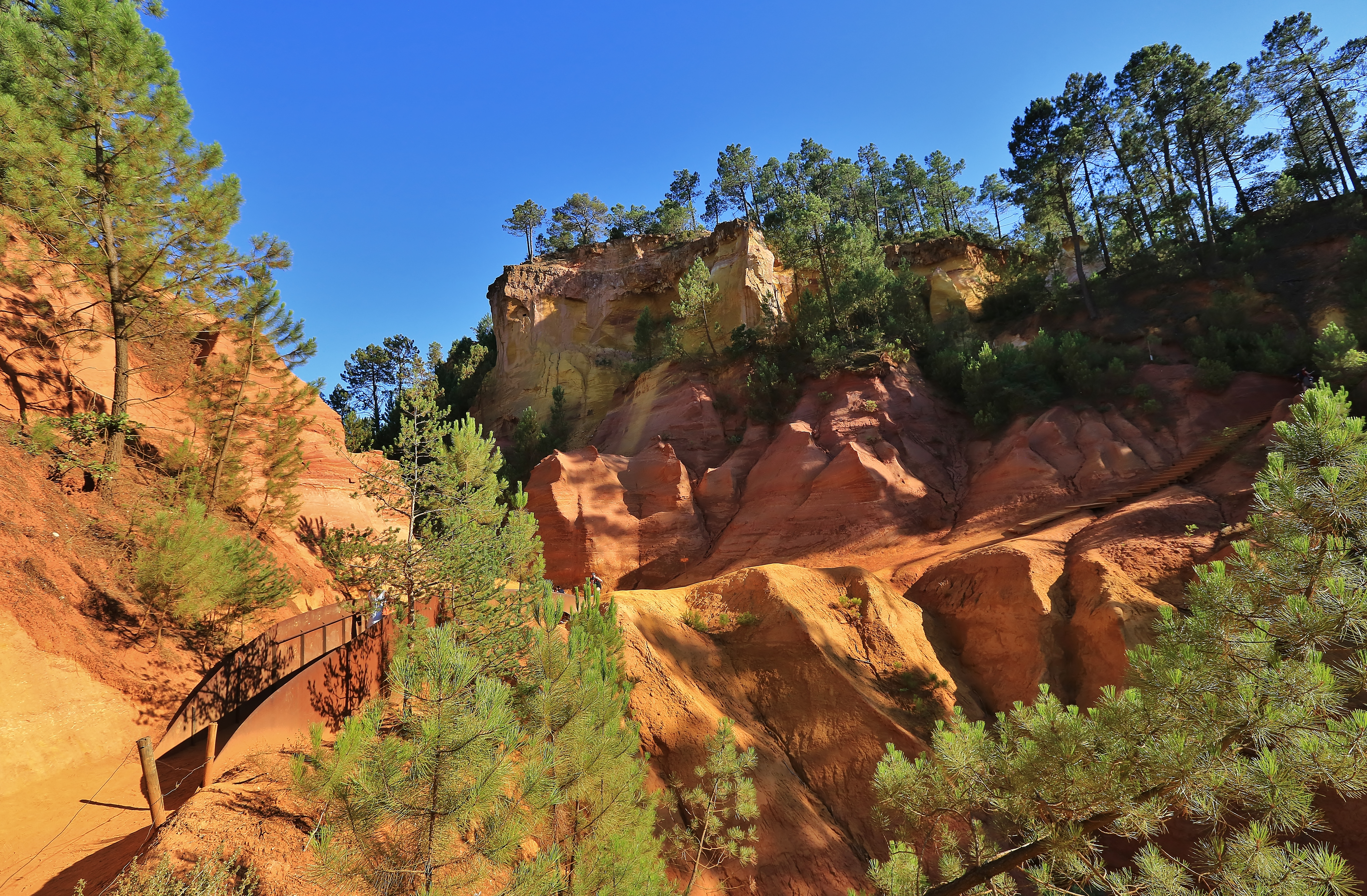 sentier des ocres